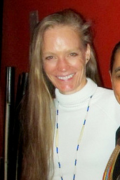 Suzy Amis, Marina e James Cameron